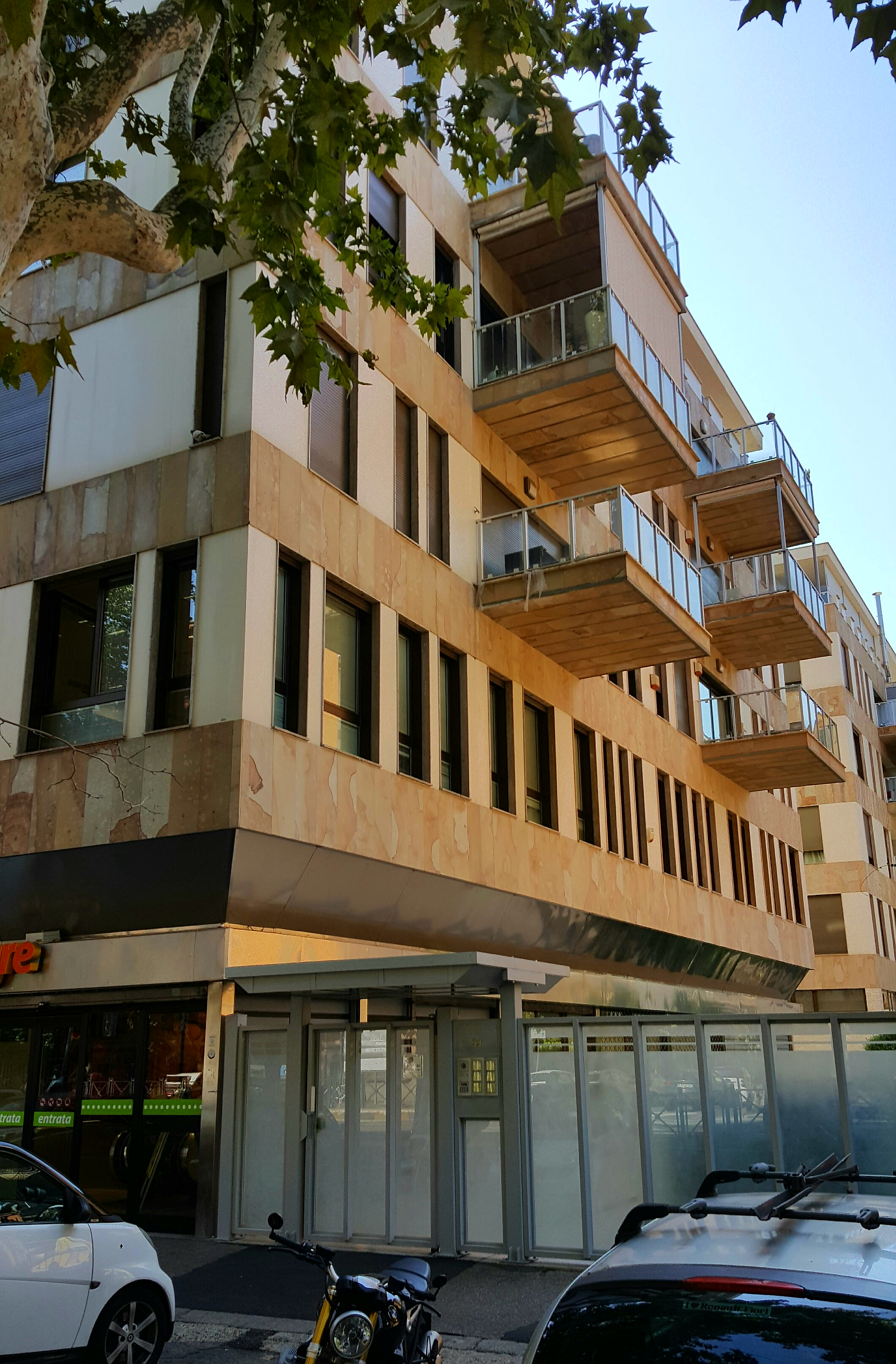 Sede Italia Nostra a Roma, Viale Liegi, 33, ai Parioli